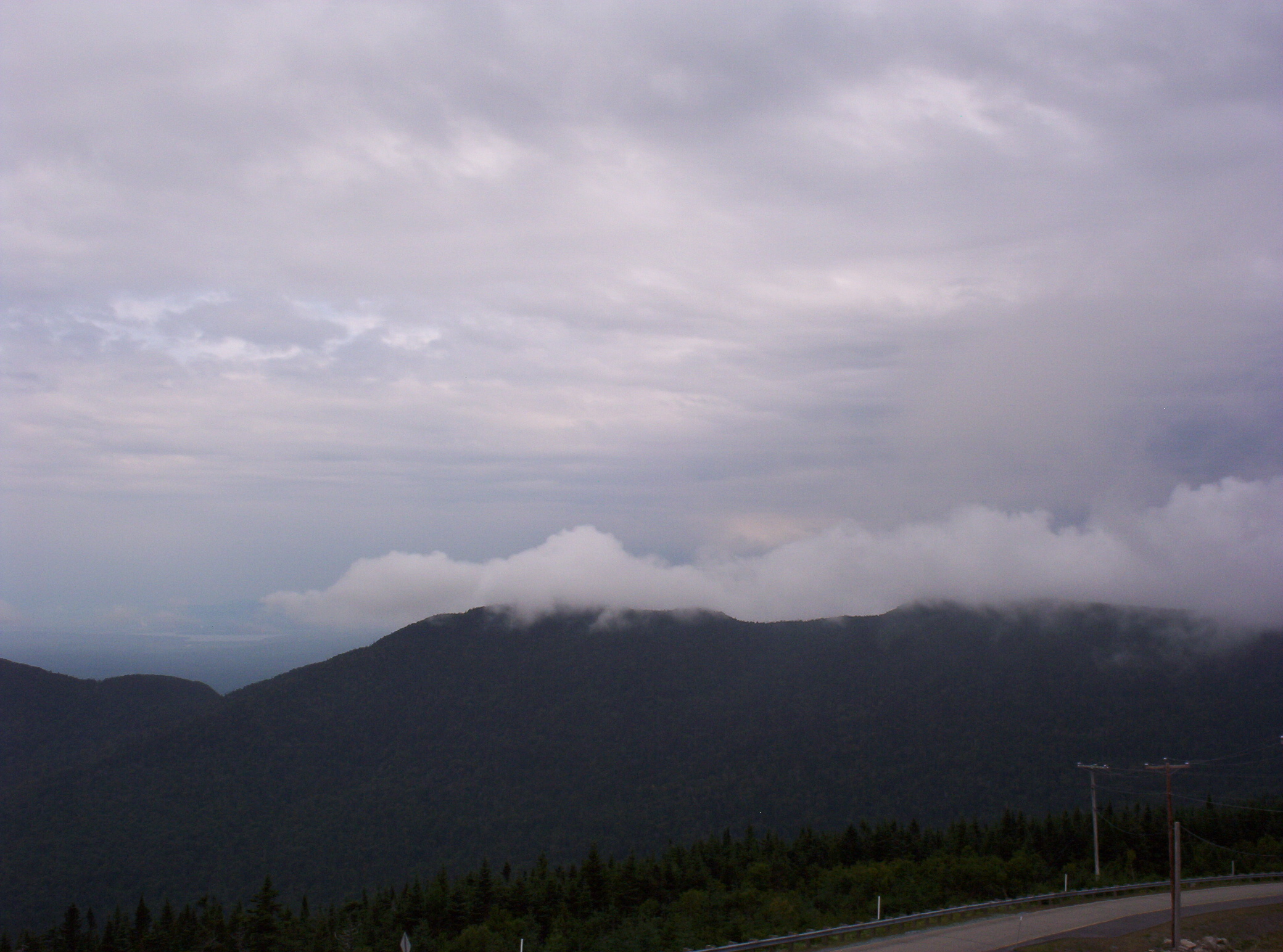 Le Mont-Victoria (Estrie) vu du Mont Mégantic